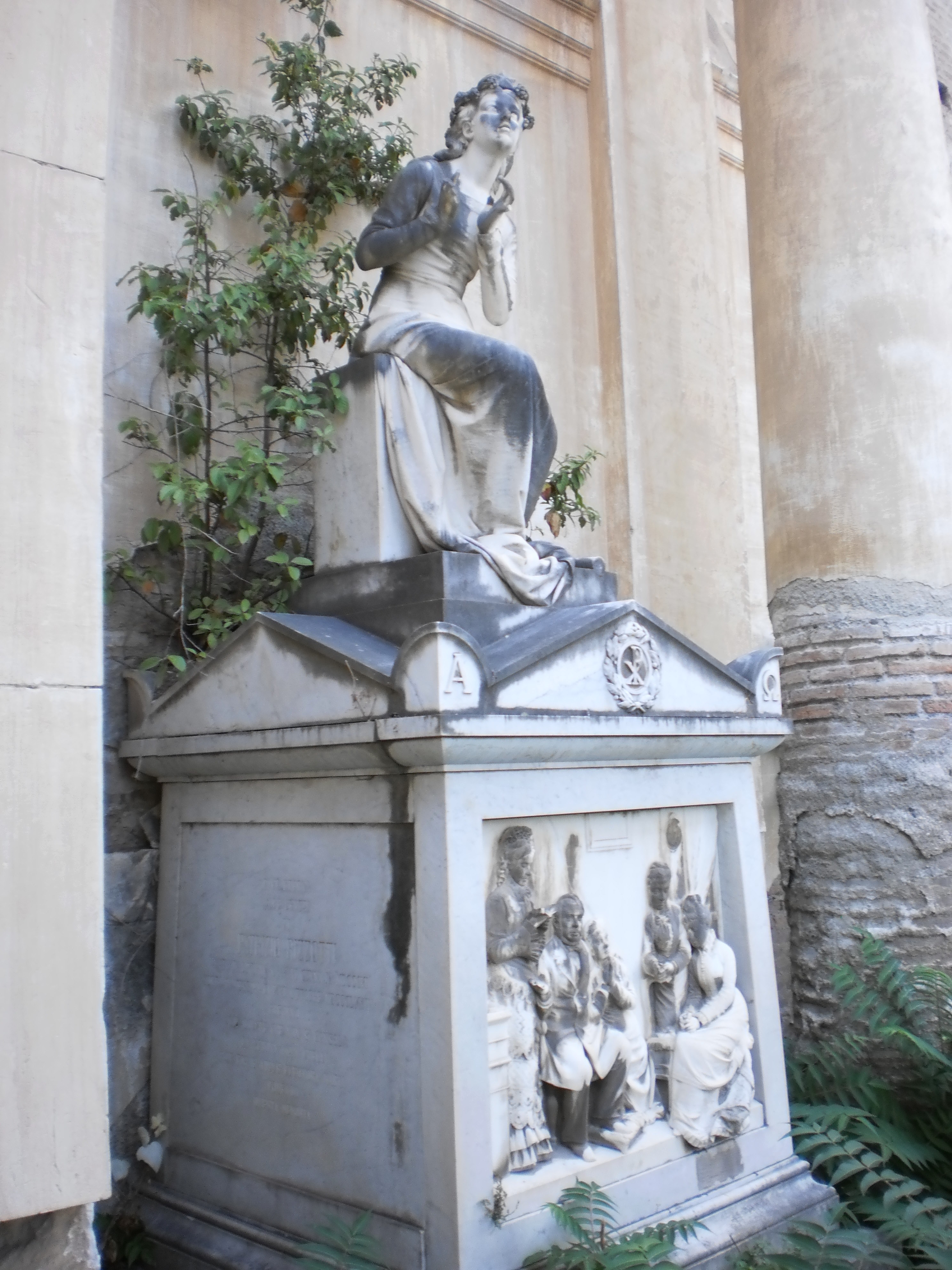 Tomba di Patrizio Rizzotti, banchiere